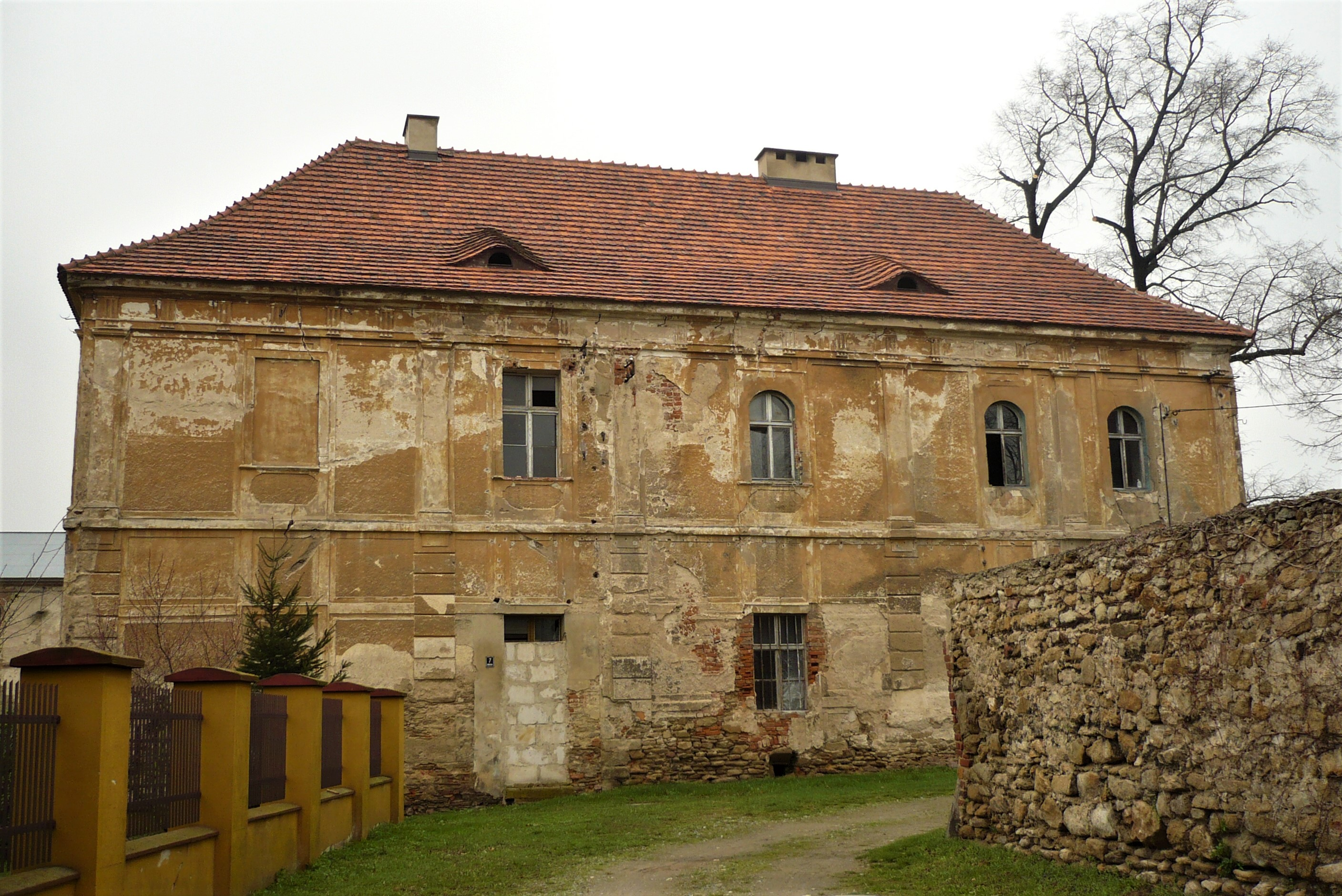 Budynek w Wierzbnej